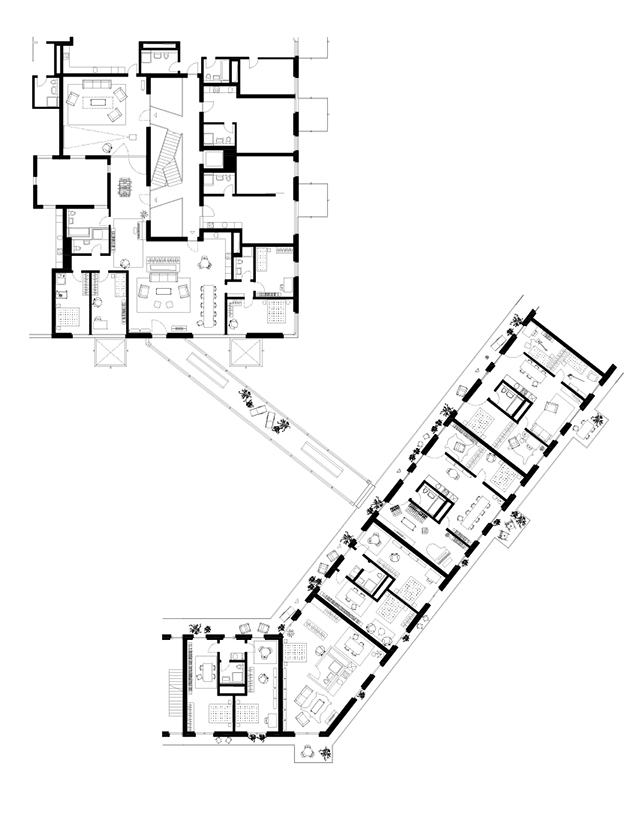 Plan de la coopérative Baufeld E, Schneider